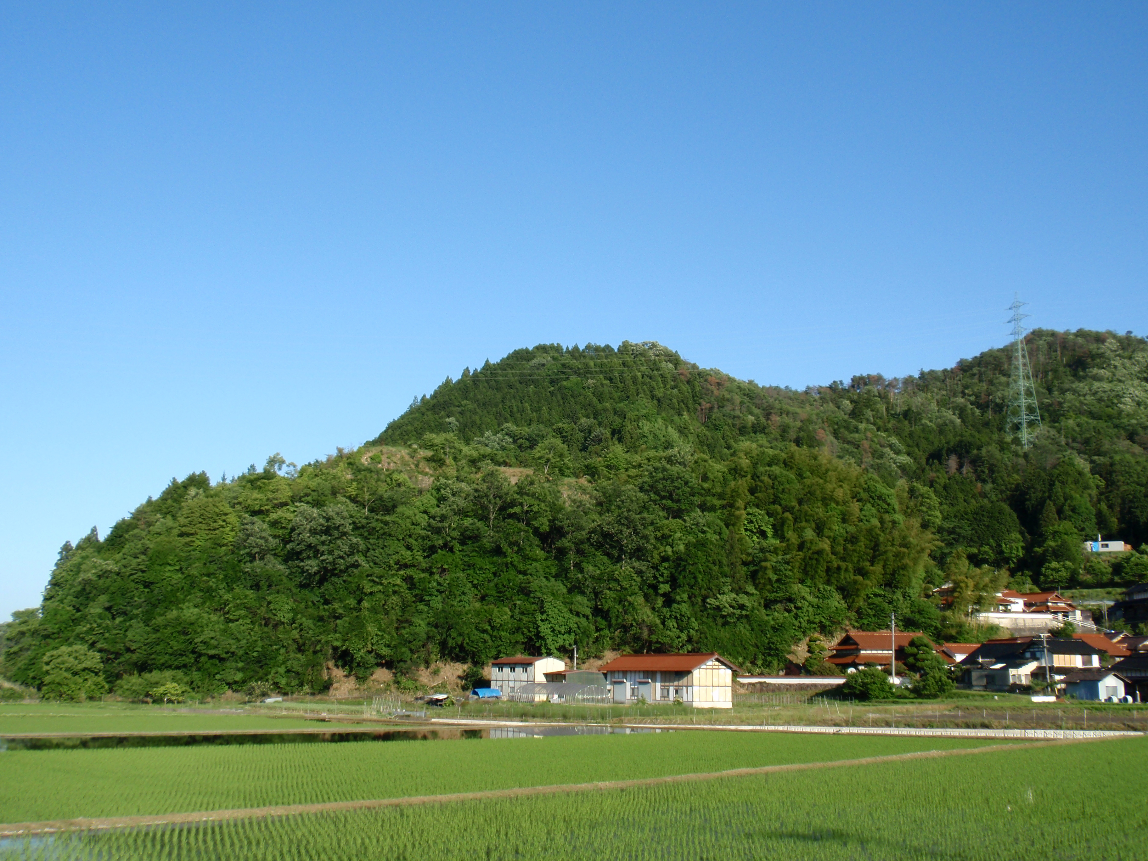 広島県安芸高田市の多治比猿掛城跡遠景